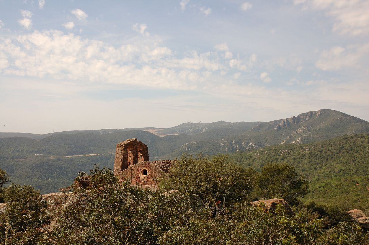 L'ermita del castell d'Eramprunyà. Al fons el massís del Garraf, la Morella i l'abocador de Barcelona que hi treu el nas